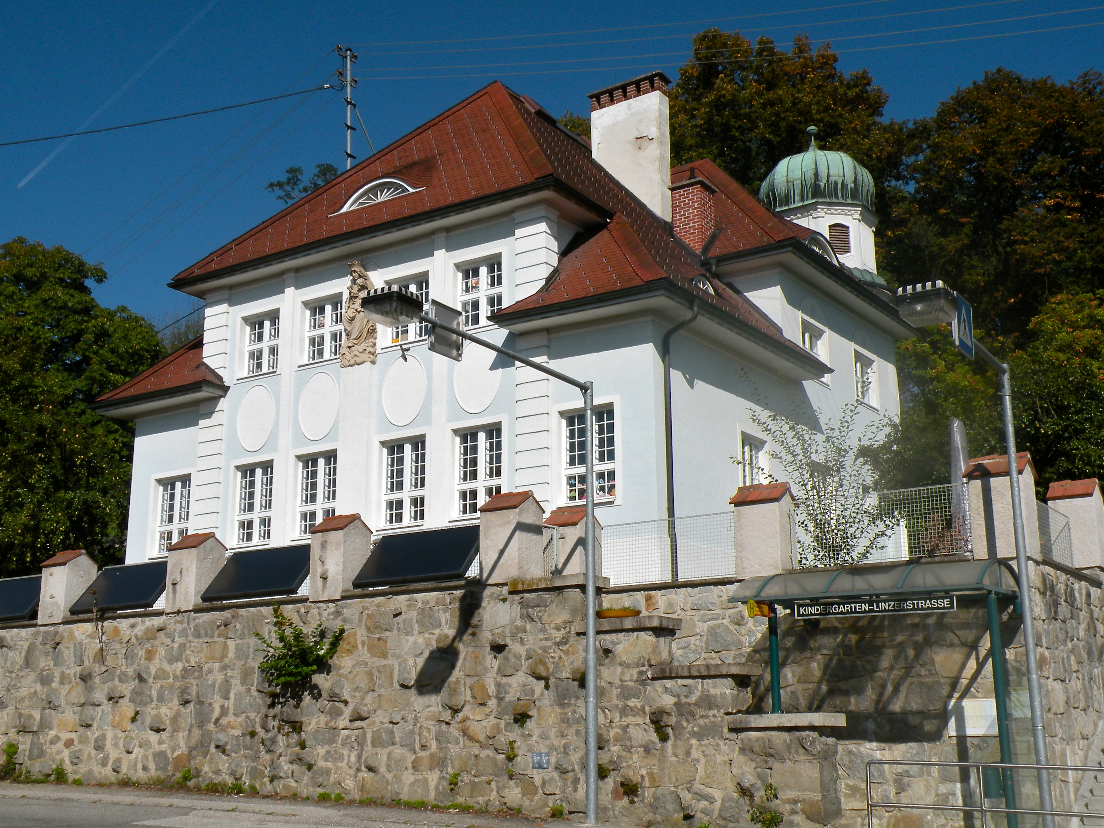 Mauthausen Caritas-Kindergarten